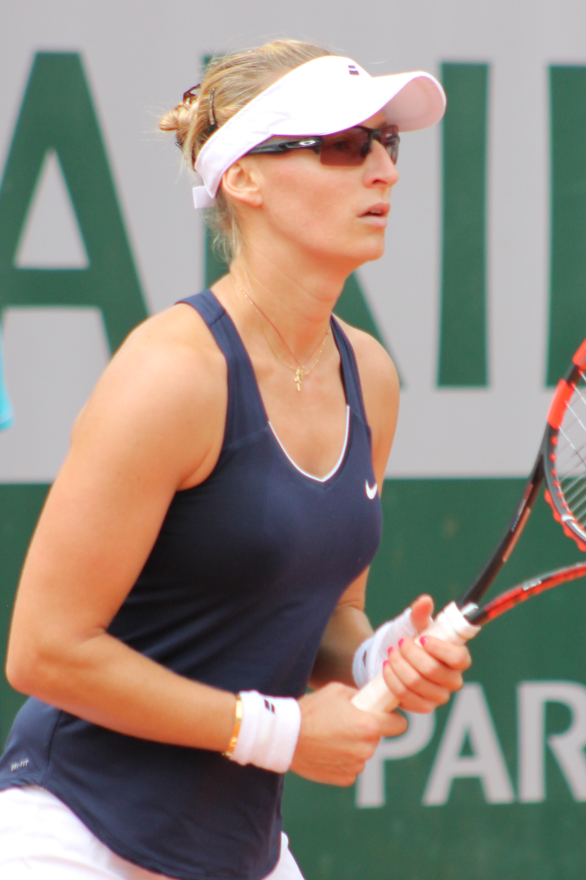 Lucic Baroni RG16 (1)